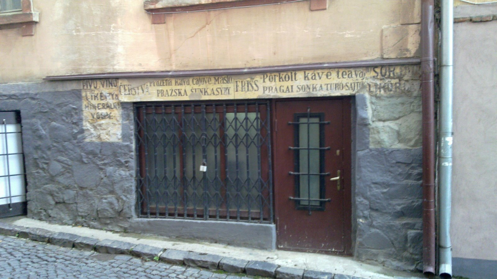 Uzhhorod, Zakarpats'ka oblast, Ukraine